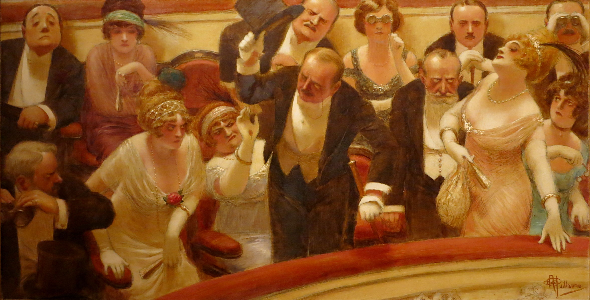 Late comers